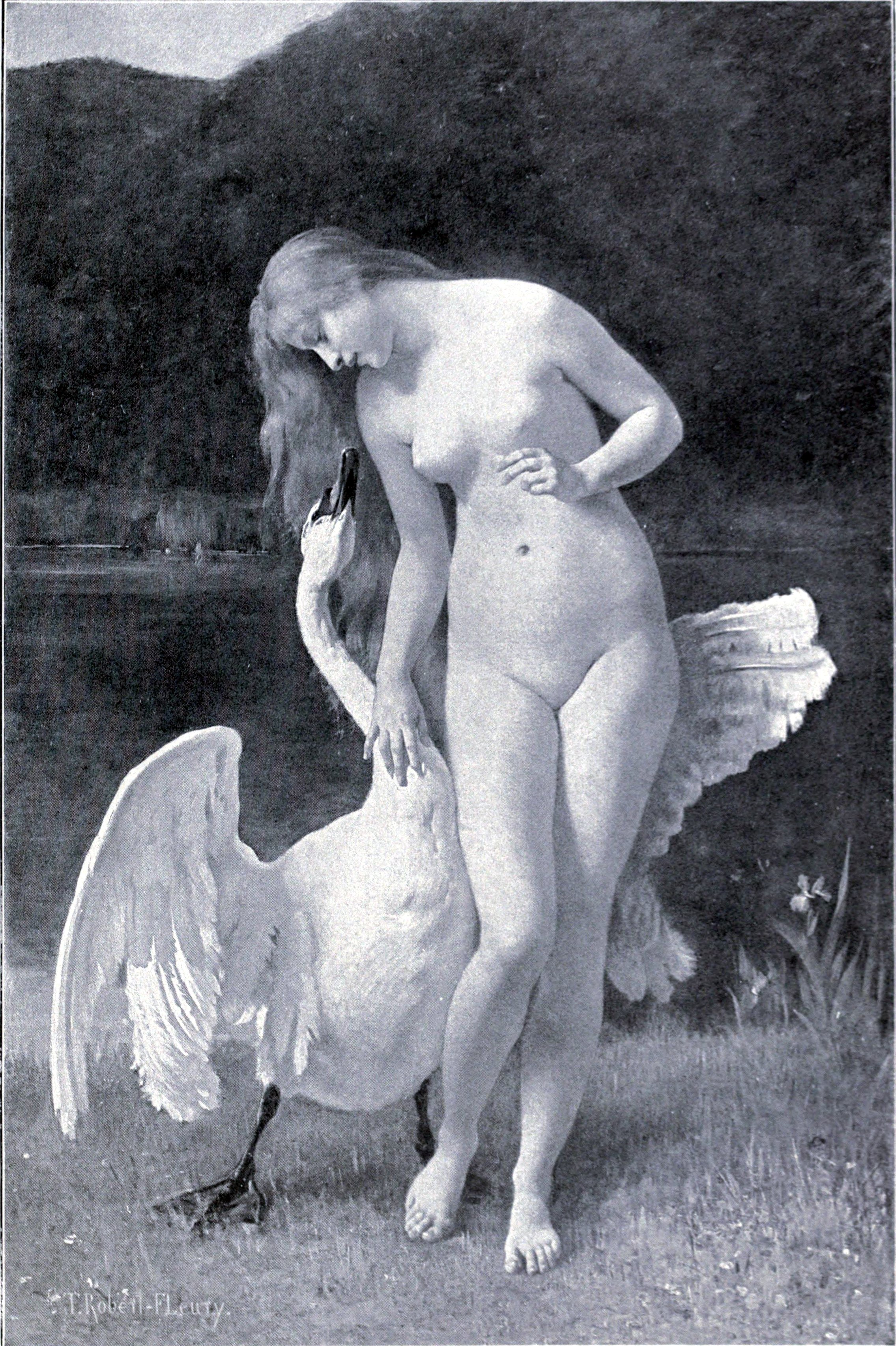 Léda